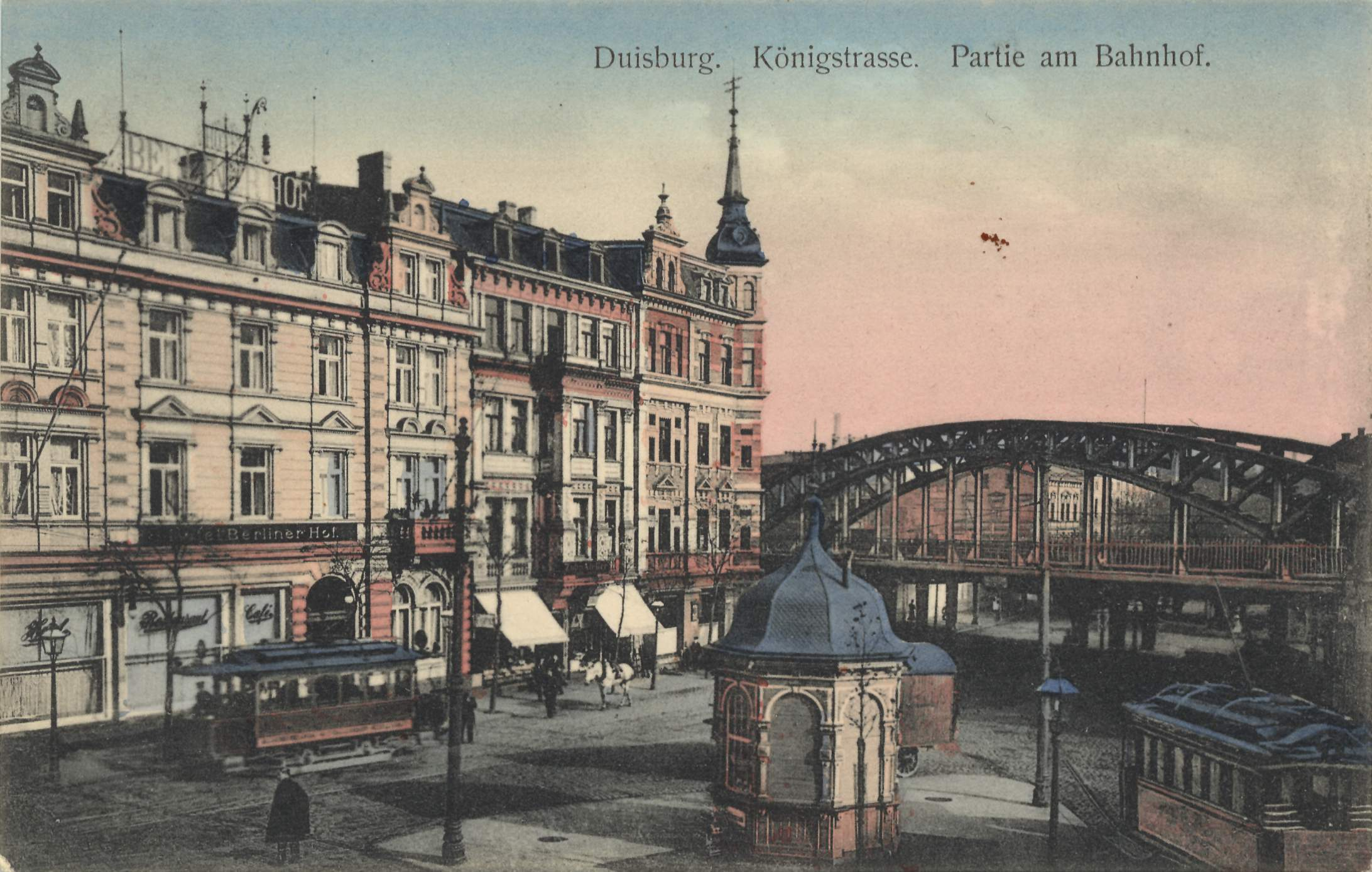 Eisenbahnbrücken über der Königstraße / Mülheimer Straße nördlich am Hauptbahnhof in Duisburg, vermutlich um 1910